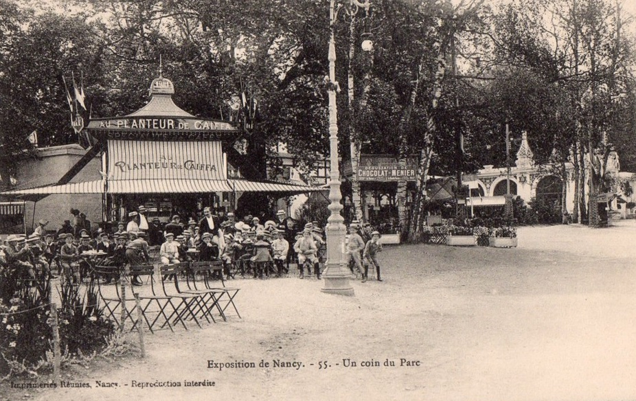 Au Planteur de Caïffa à l'exposition de Nancy (probablement en 1909).